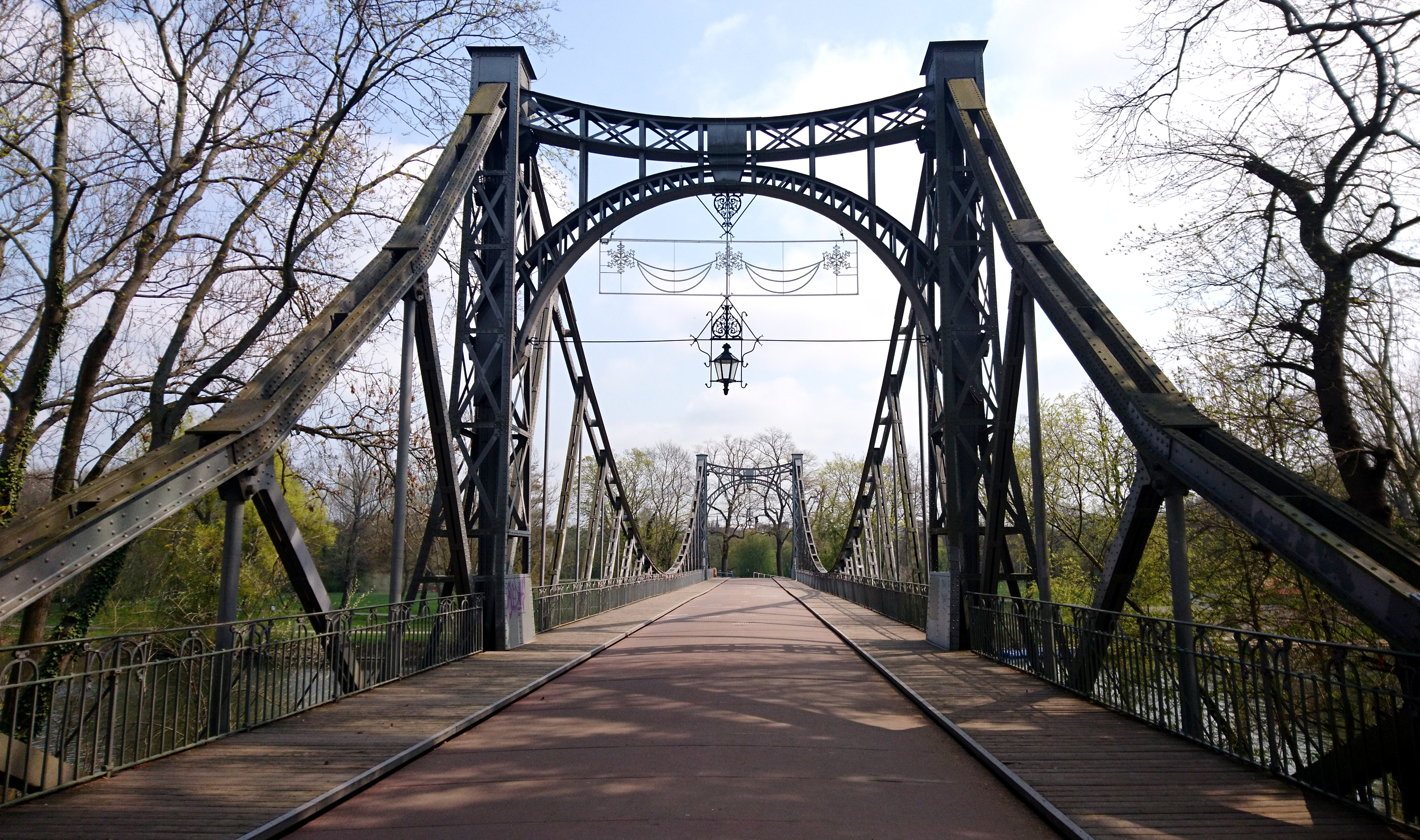 Peißnitzbrücke Halle/Saale